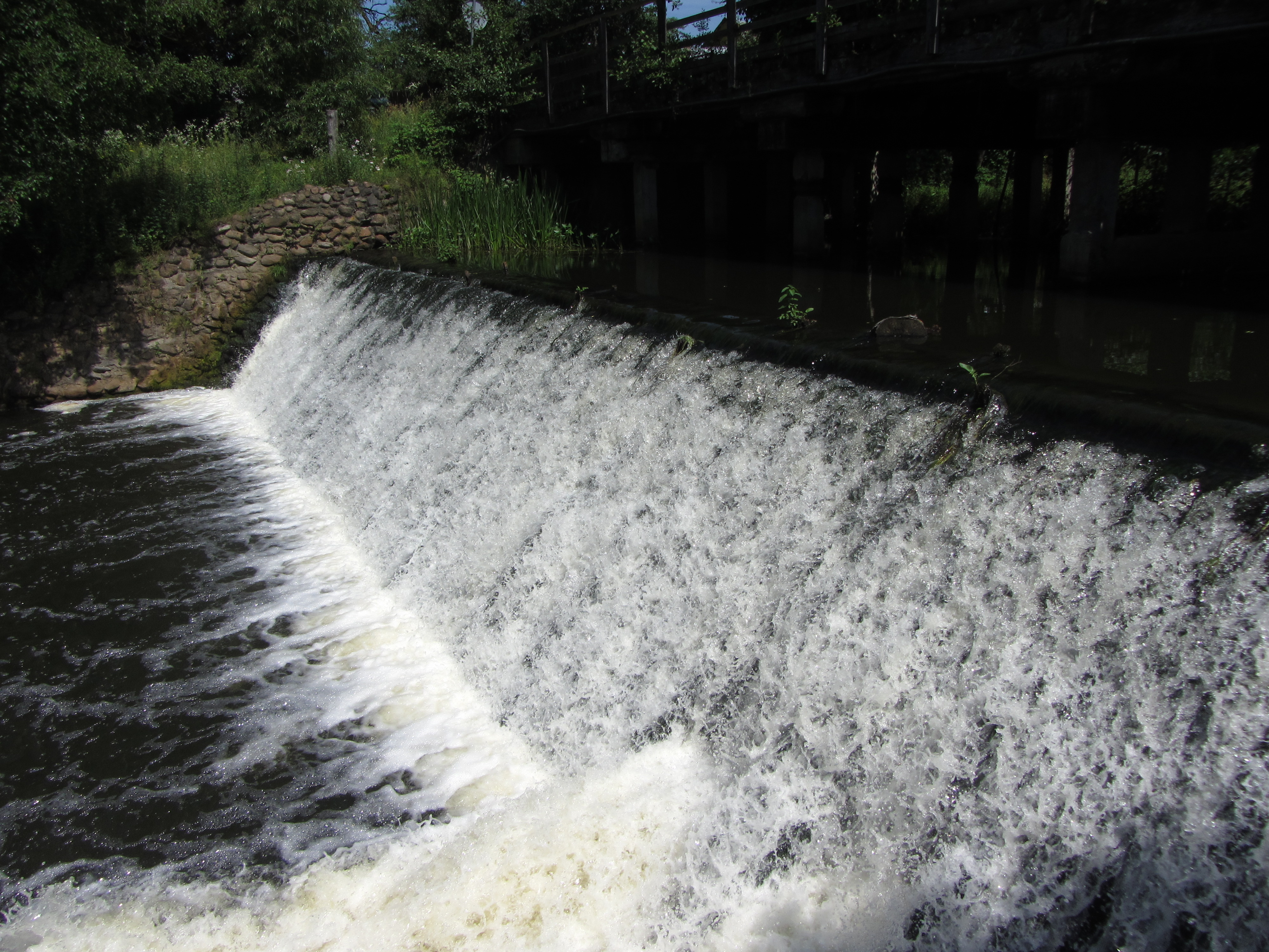 Rudnia, Lithuania